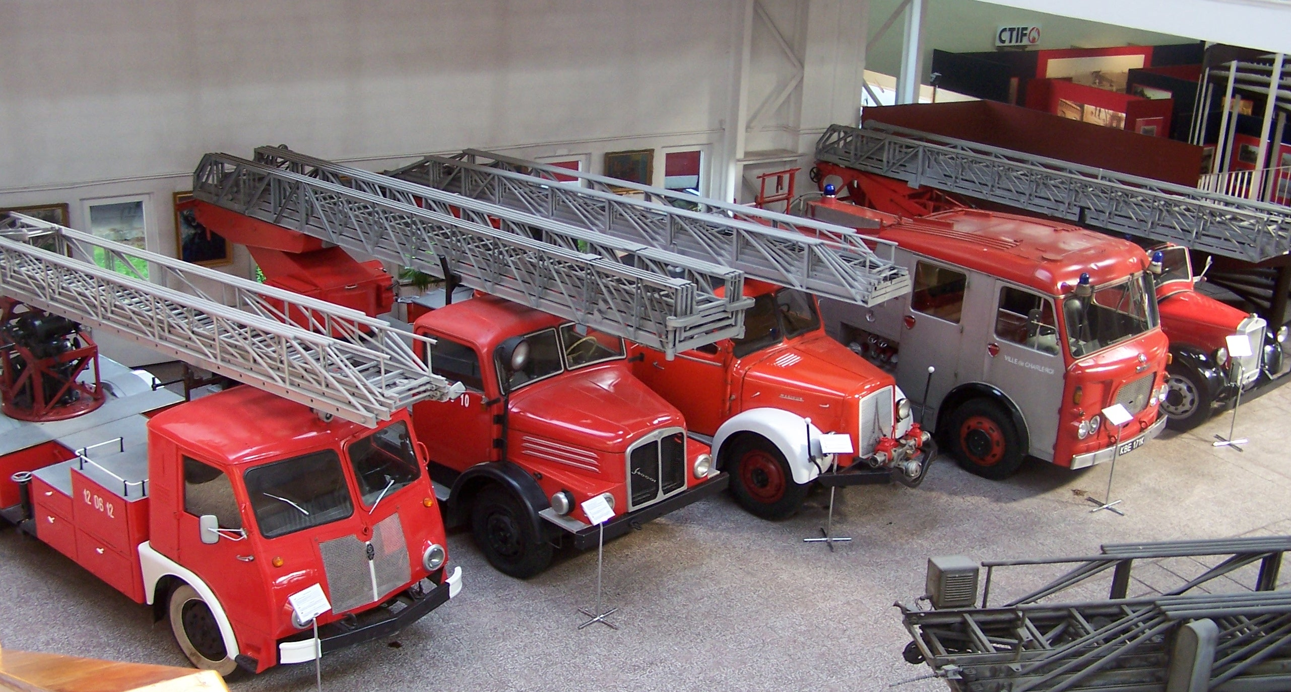 Muzeum Pożarnictwa w Mysłowicach - wozy strażackie.